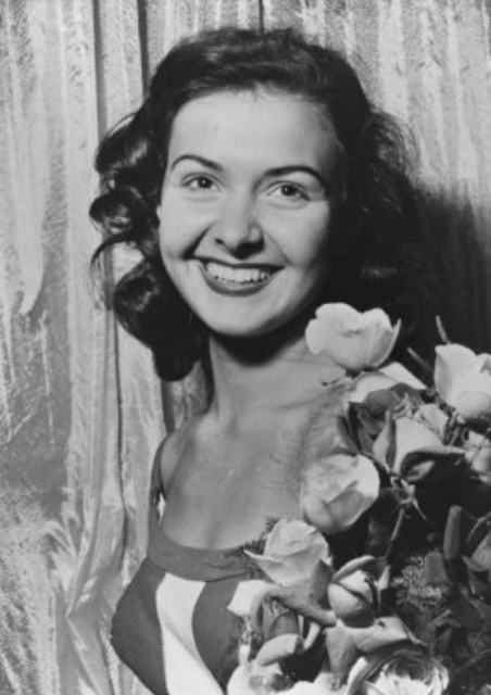 Collectie / Archief Fotocollectie : Anefo Reportage / Serie Miss World Beschrijving : Miss World 1953, Denise Perrier, Frankrijk Datum : 11 oktober 1953 Trefwoorden : missen, missverkiezingen, portretten Persoonsnaam : Perrier, Denise Fotograaf : Agip Bestanddeelnummer : 906-0274 Materiaalsoort : Glasnegatief